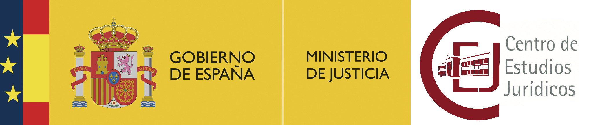 Logotipo del Centro de Estudios Jurídicos de España